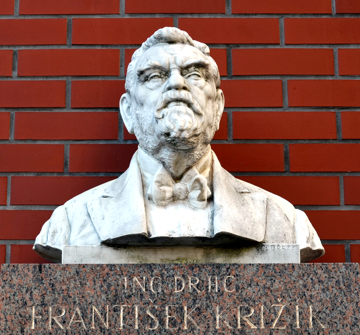 Rudolf Březa, busta Františka Křižíka, Praha-Vinohrady, Nitranská 2226/1.